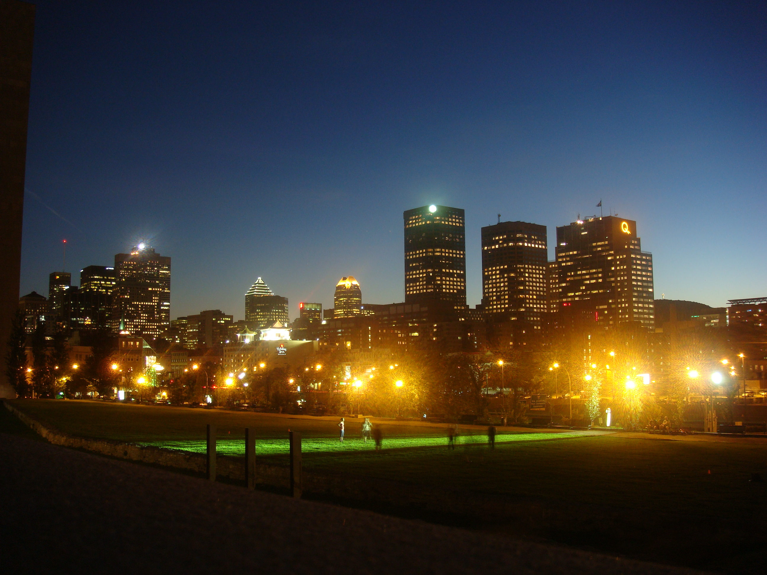 مدينة مونتريال كندا